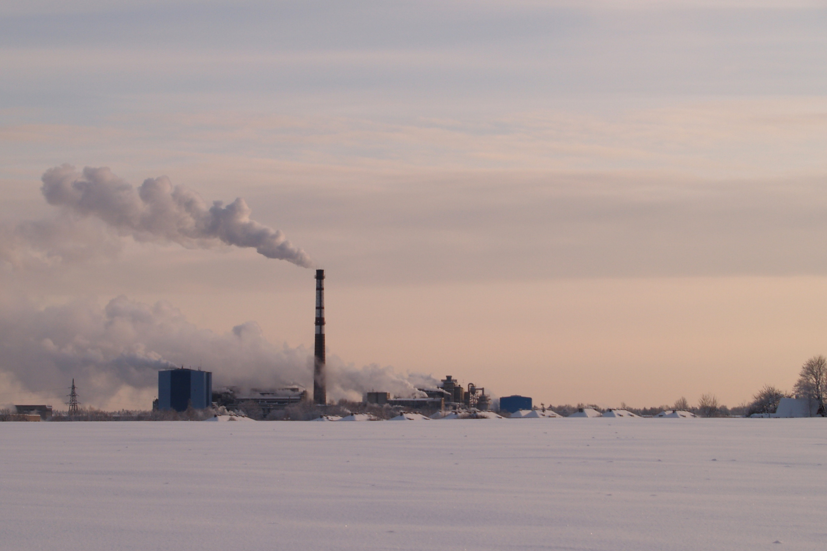 Kehra tselluloositehas talvel.